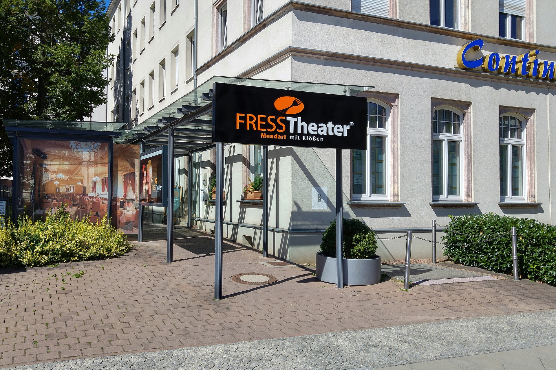 Eingang zum "Fress-Theater" am Bahnhofsvorplatz